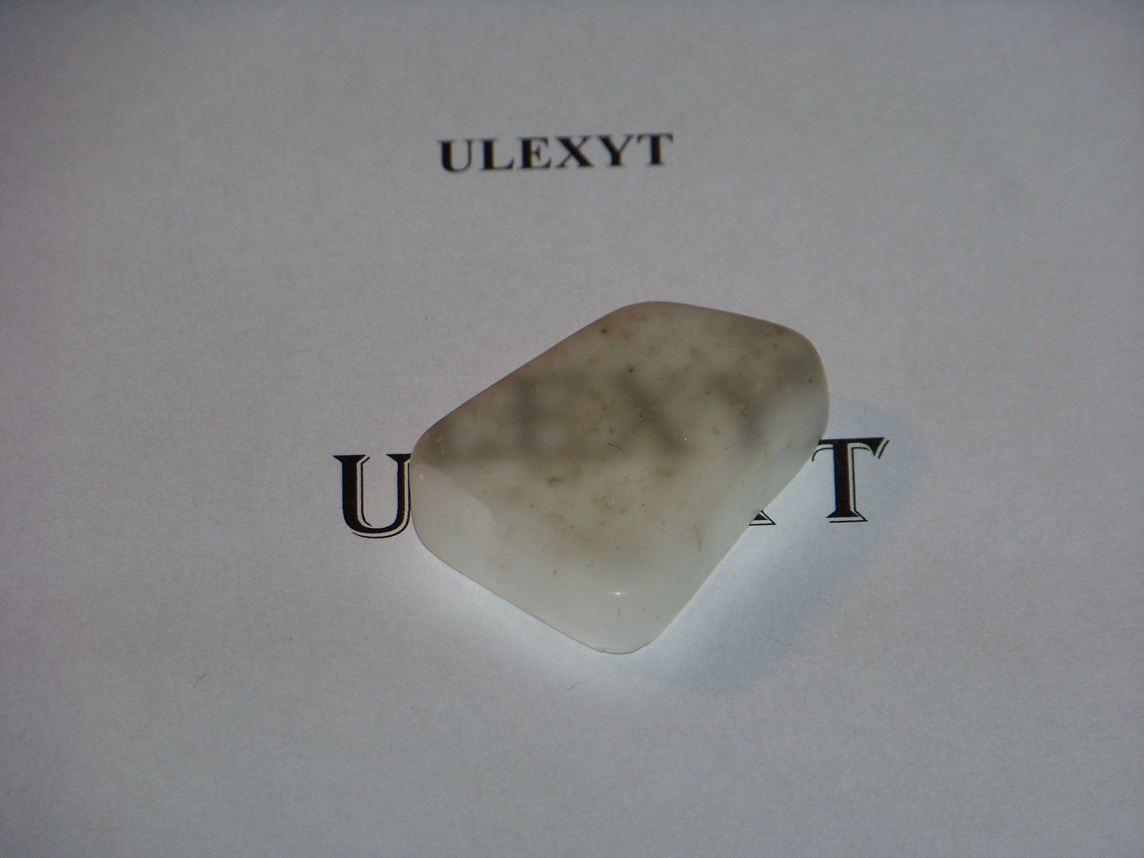 Ulexyt, widok z boku